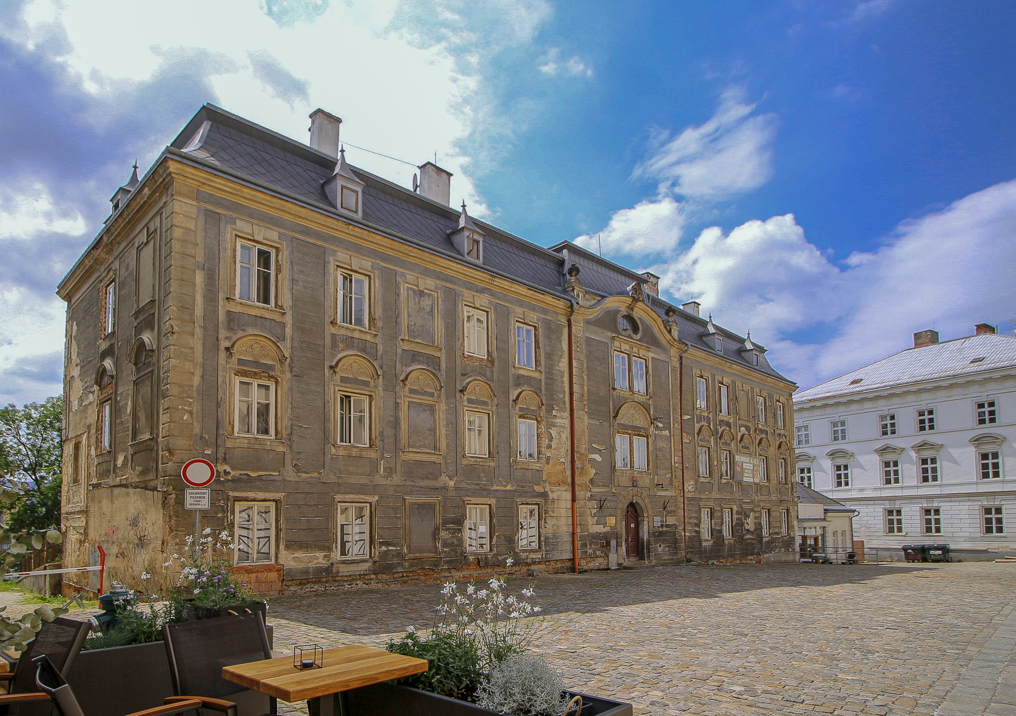 Liberecký kostel svatého Antonína Velikého